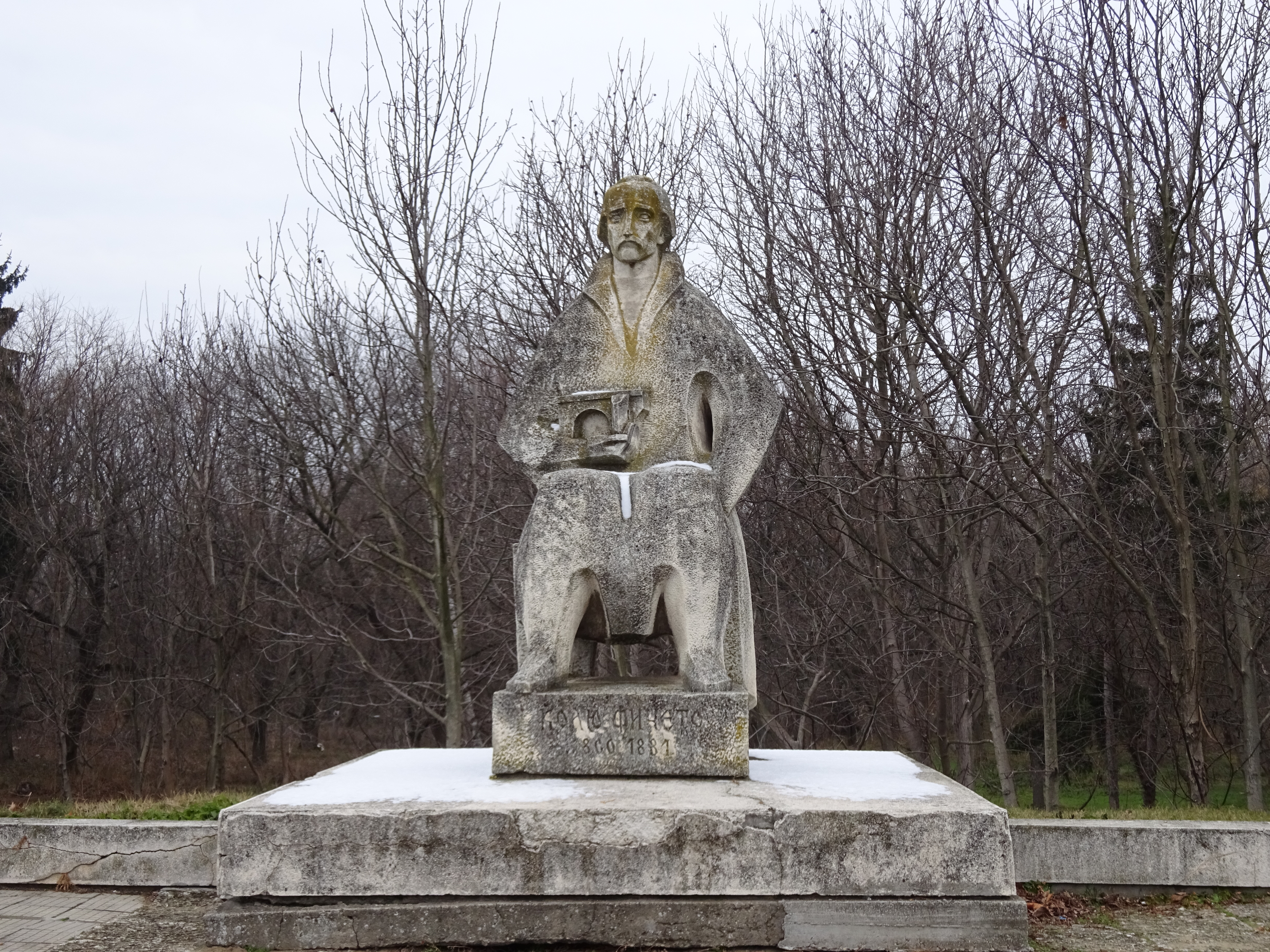 Паметник на Кольо Фичето край моста който е построил, Бяла Русенско